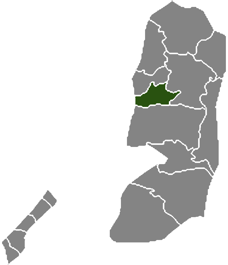 Palestine governorate Salfeit